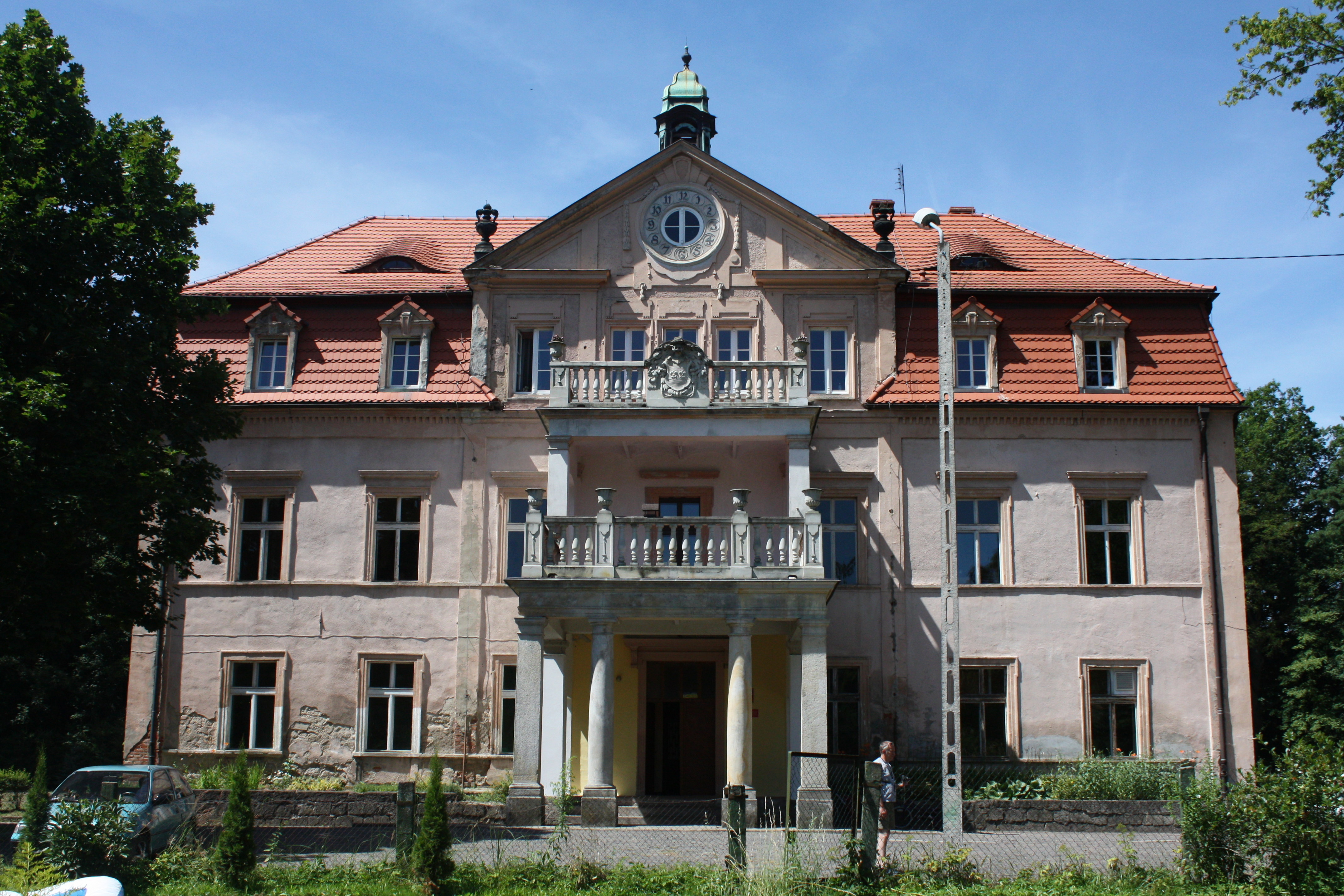 This photo of Lower Silesian Voivodeship was taken during Wikiexpedition 2013 set up by Wikimedia Polska Association.You can see all photographs in category Wikiekspedycja 2013. Permission=Ludwig Schneider put it under GFDL and Creative Commons Attribution ShareAlike 3.0,2.5,2.0,1.0 and cc-by-sa-4.0 - self